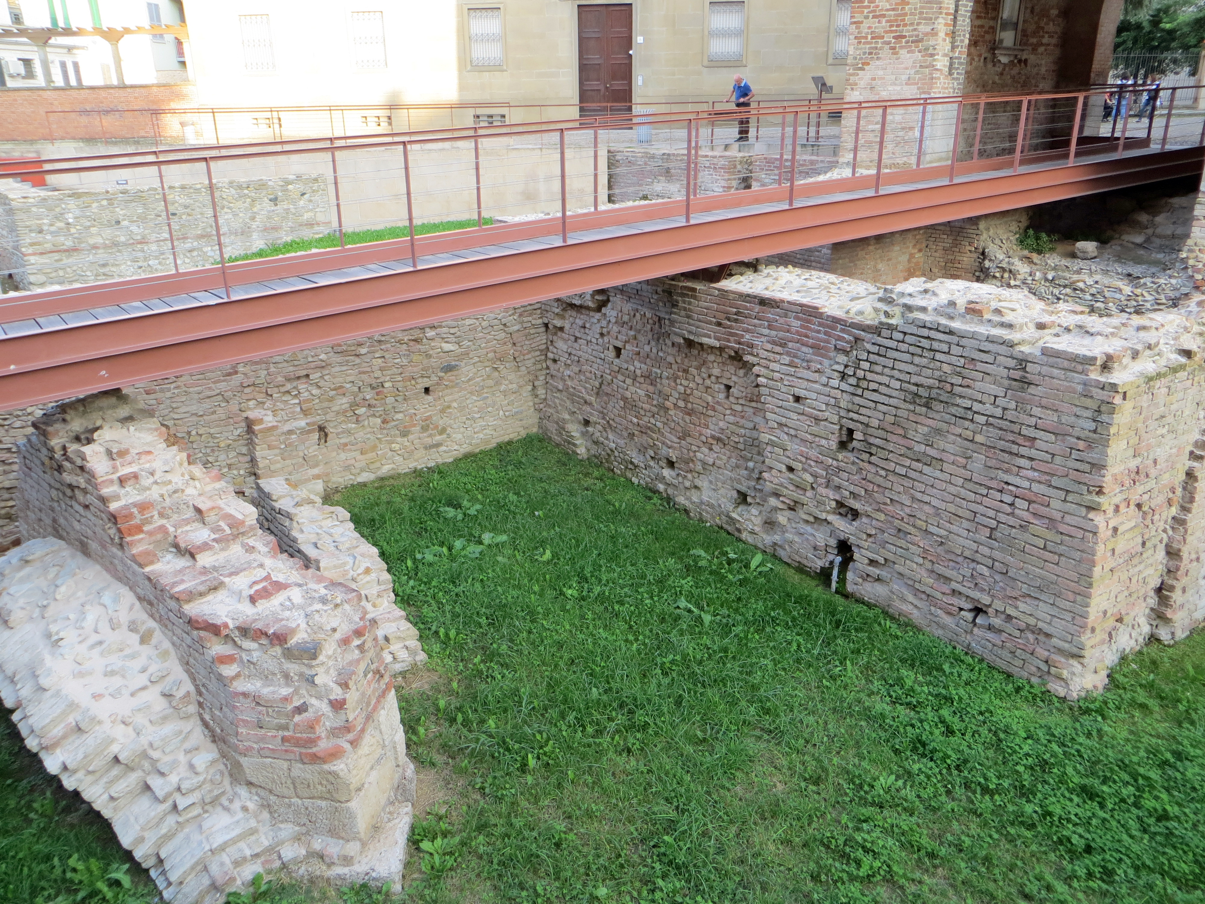 Ponte romano (Fidenza) - resti